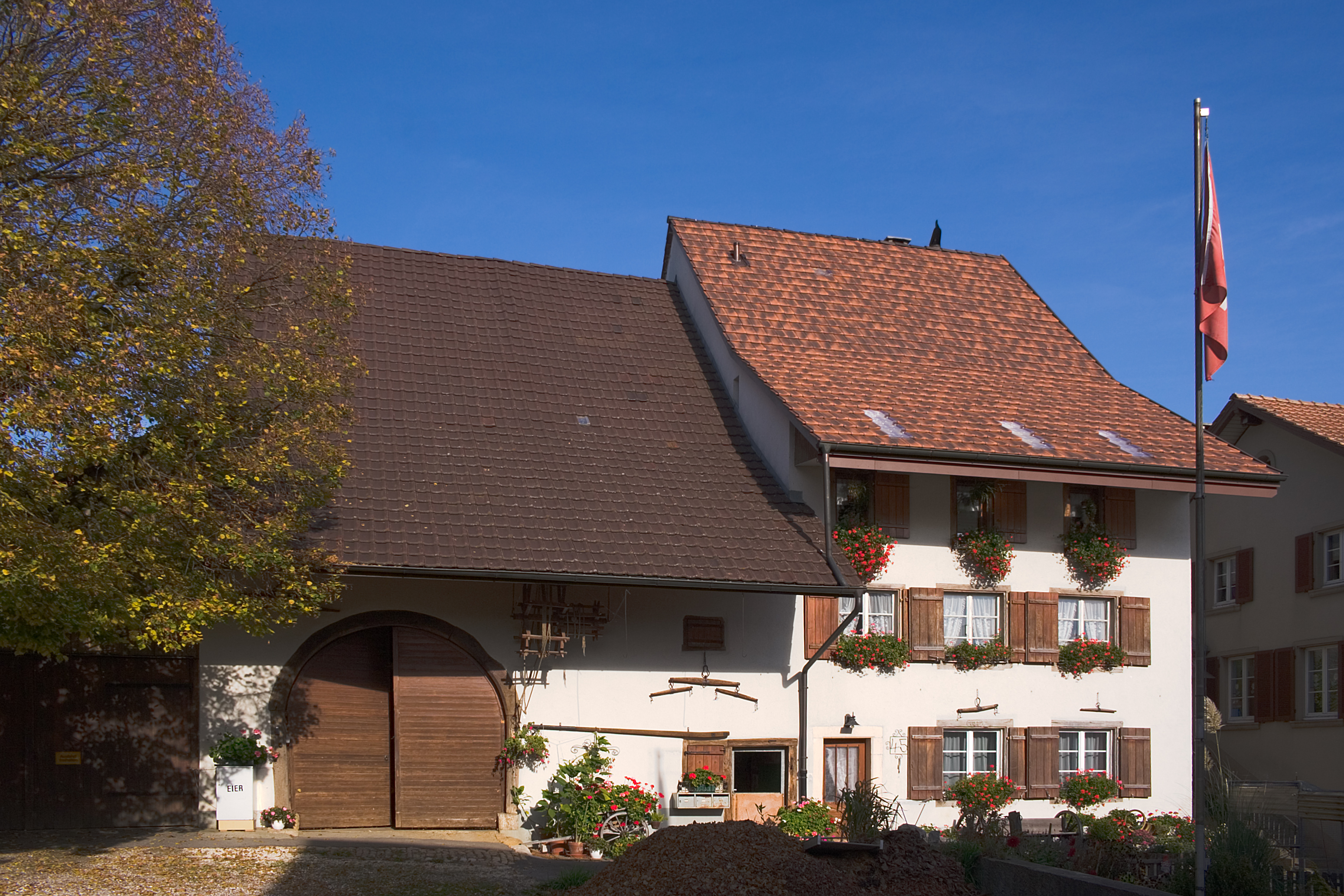 (ehemaliges?) Bauerhnaus in Anwil (BL), Schweiz